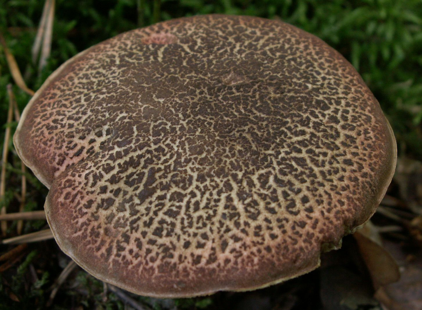 Boletus chrysenteron im Nadelmischwald